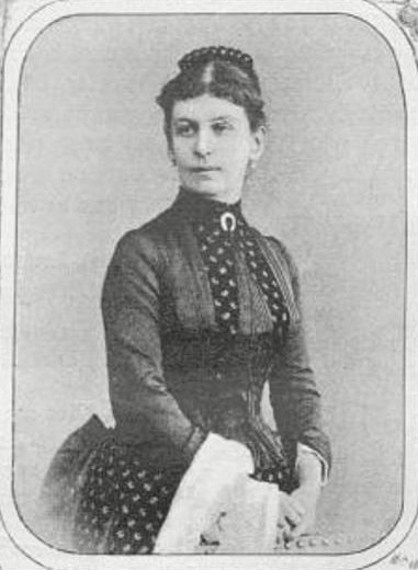 Баронесса Мария Ивановна Пален, ур. Вуич (1850—1940)